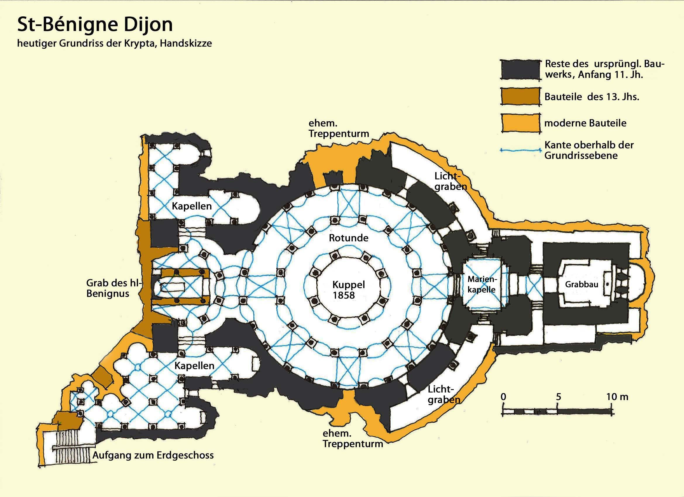 St-Bénigne Dijon. Krypta, Grundriss, Handskizze